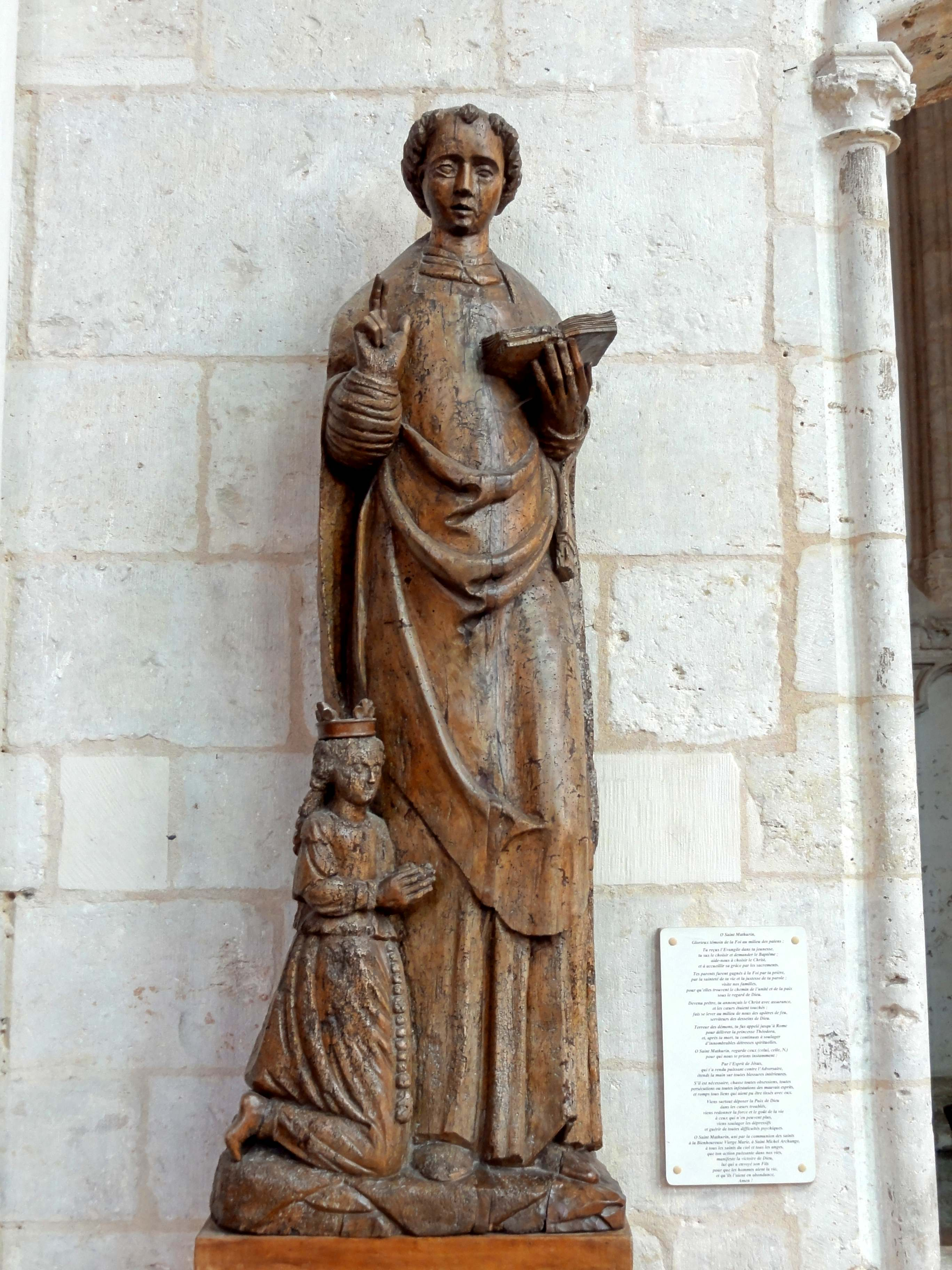 Mobilier de la basilique Saint-Mathurin de Larchant - voir titre.